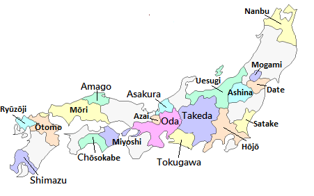 Maggiori clan giapponesi nel 1570